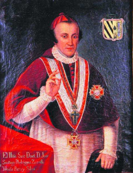 José Santiago Rodríguez Zorrilla (1752-1832). El obispo realista de Santiago de Chile.